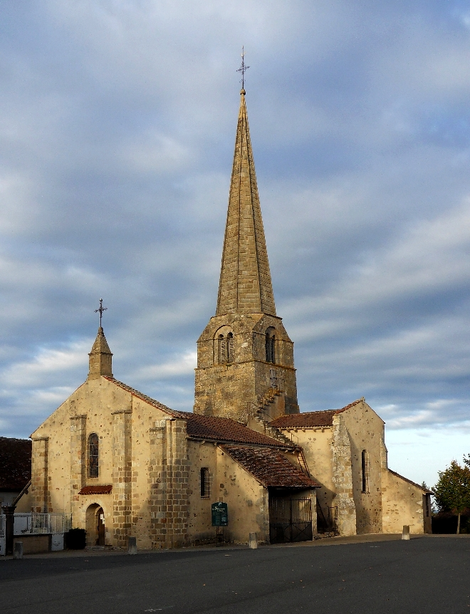 Église Saint-Martin (Inscrit) .